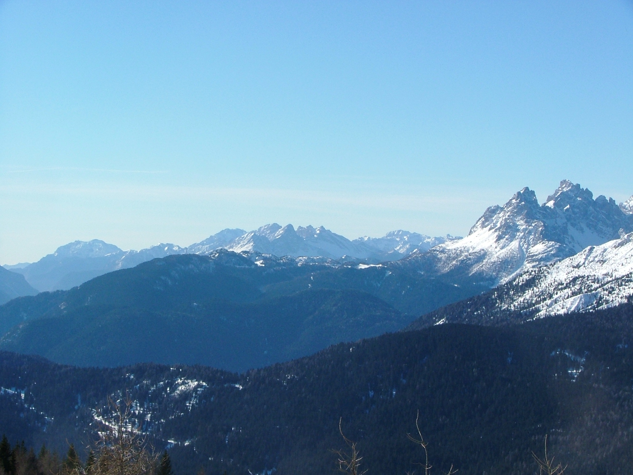 Marmarole e Pian de Buoi, Lozzo di Cadore, Belluno, Veneto, Dolomites, Italy